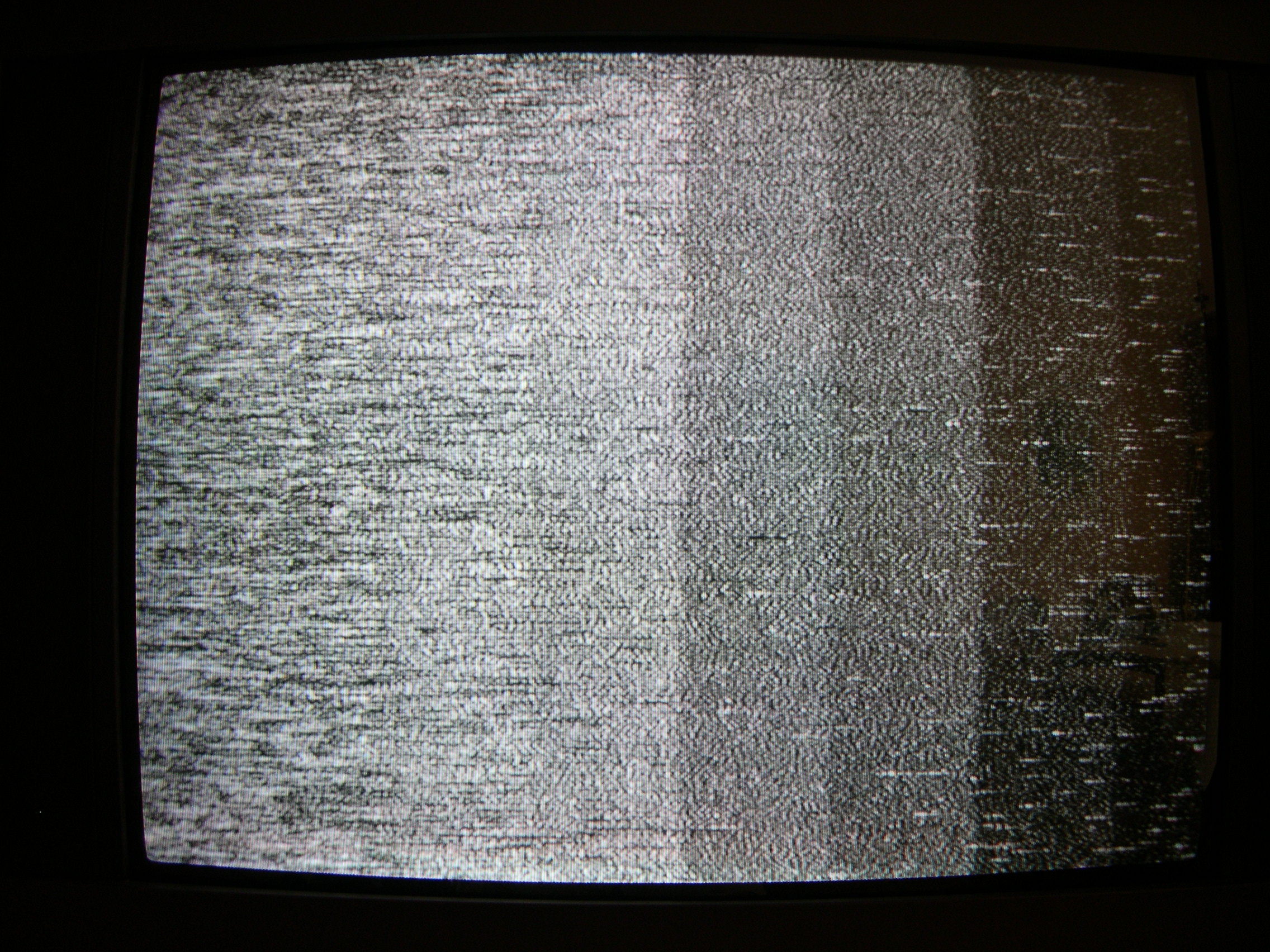 Aspect d'image avant préamplification, modulation FM 2.4 GHz ISM. On observe un fort bruit et une intensité gênante de clics. Le signal est en limite de commutation noir/blanc-couleur.